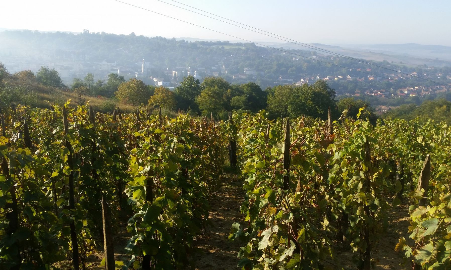 Szőllős Nagydobán, Szilágy megyében.